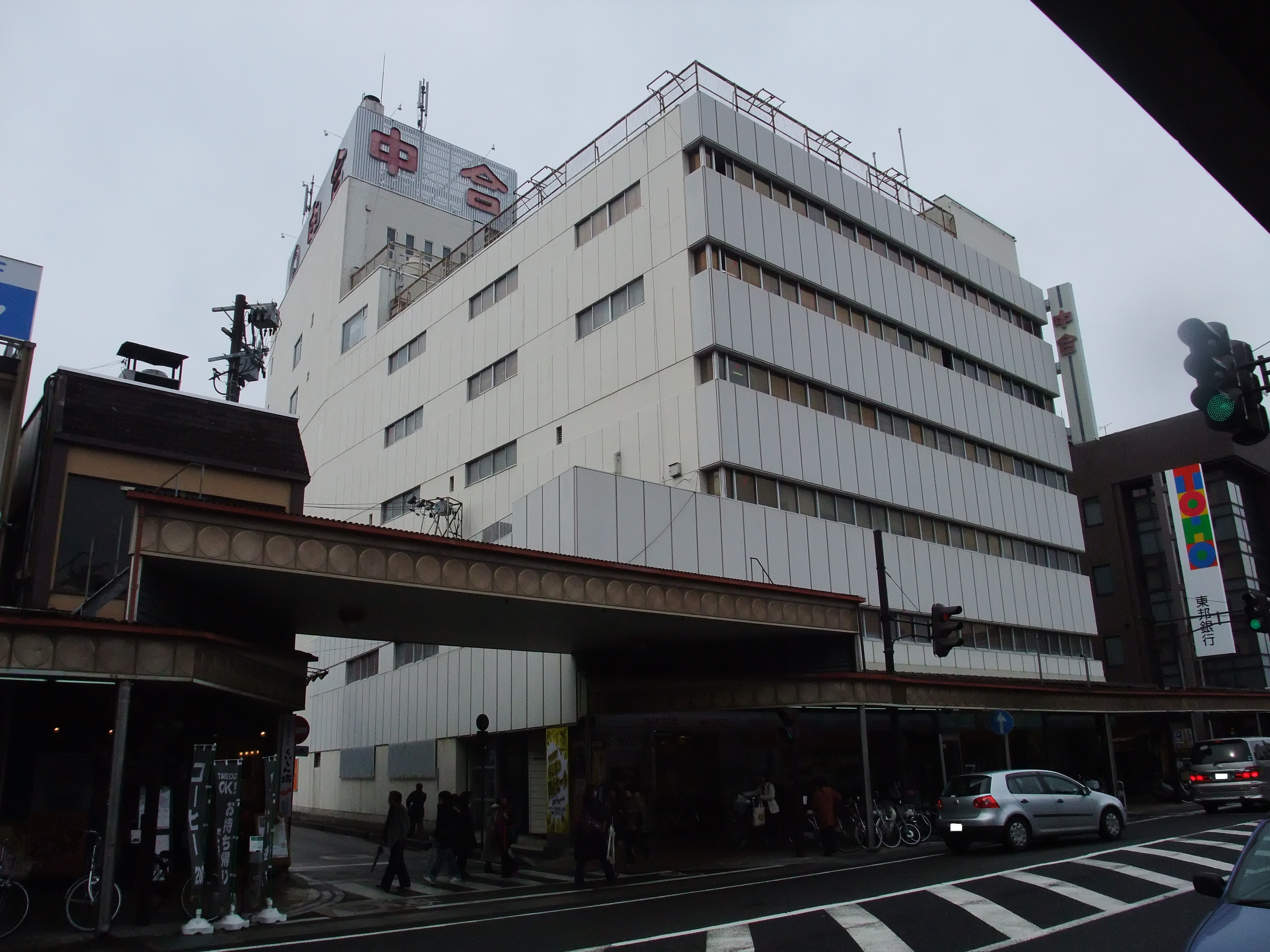 中合会津店の店舗外観(営業最終日に撮影)